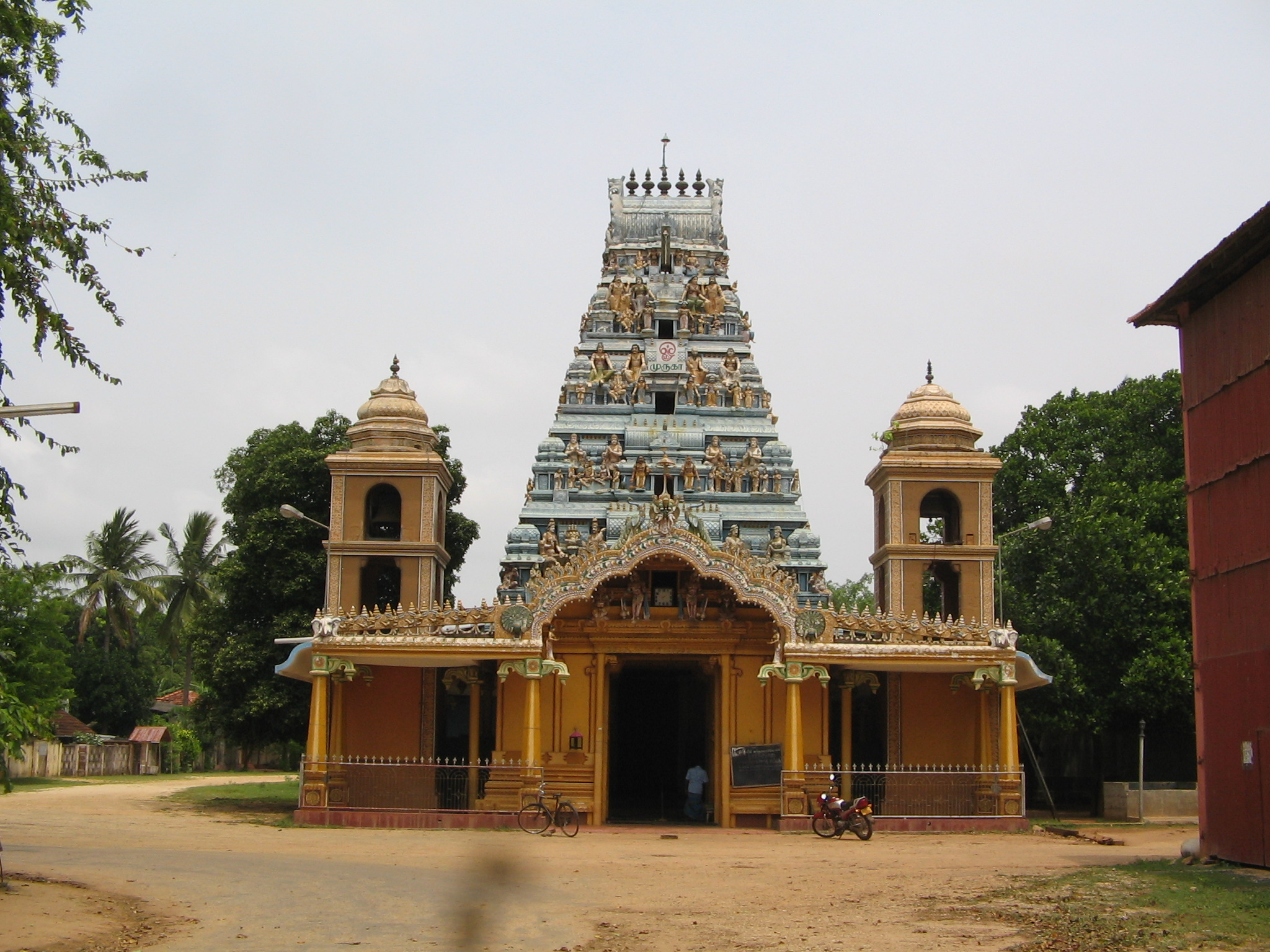 இணுவில் கந்தசுவாமி கோயில்